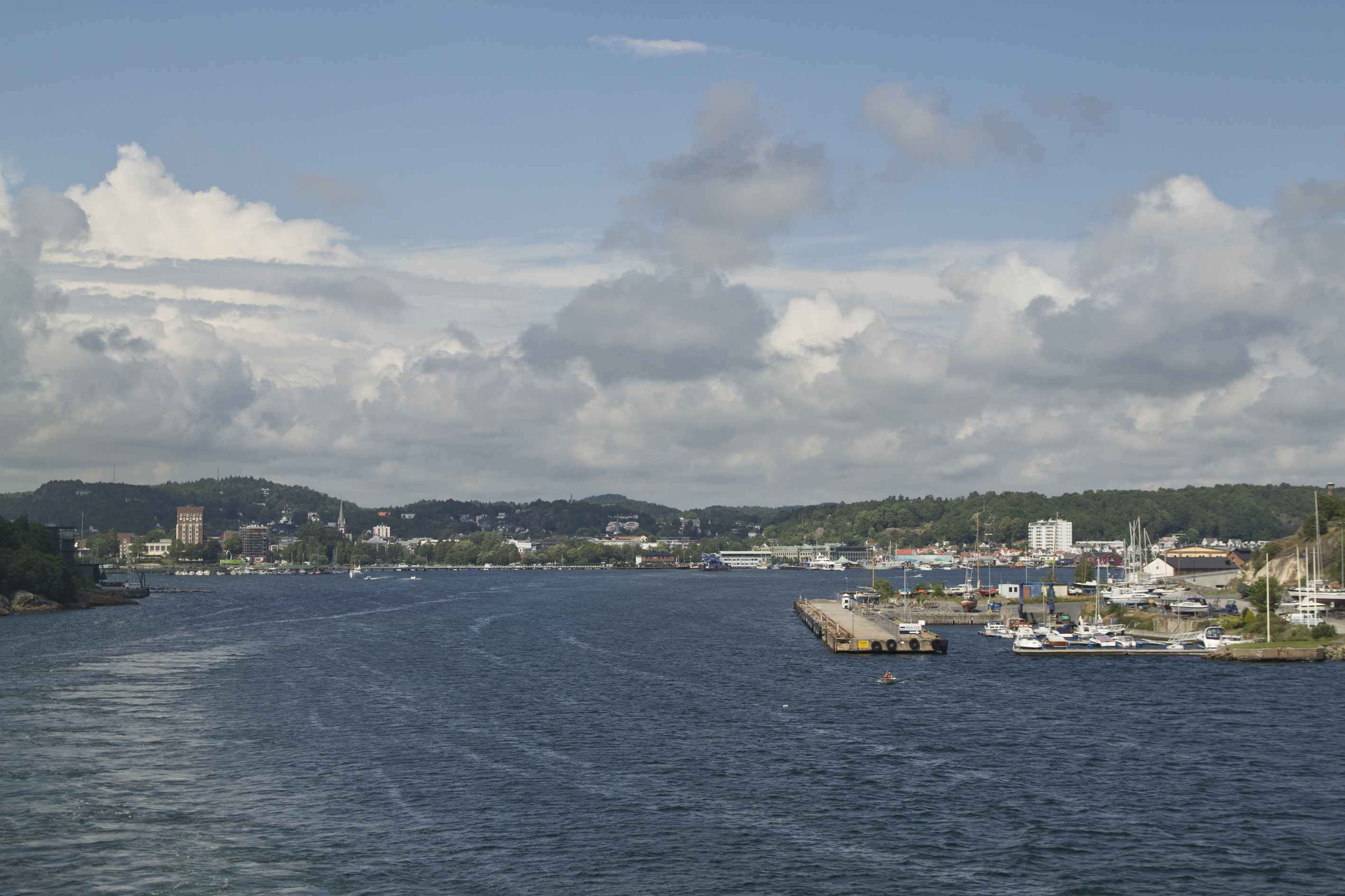 Sandefjord